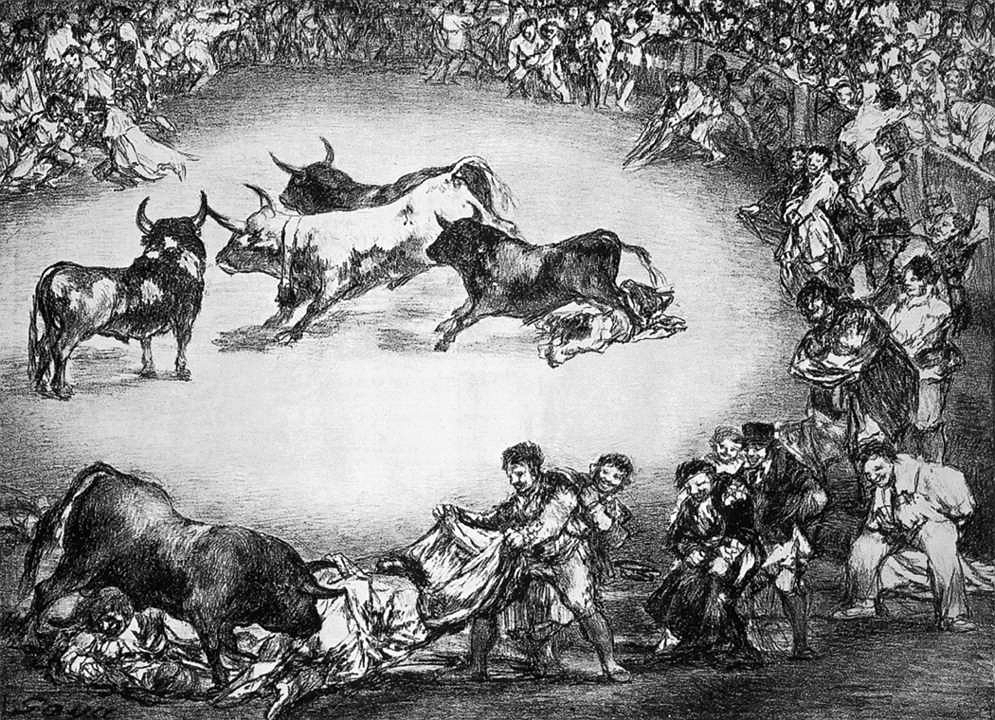 «Diversión de España» Litografía perteneciente a "Los toros de Burdeos"